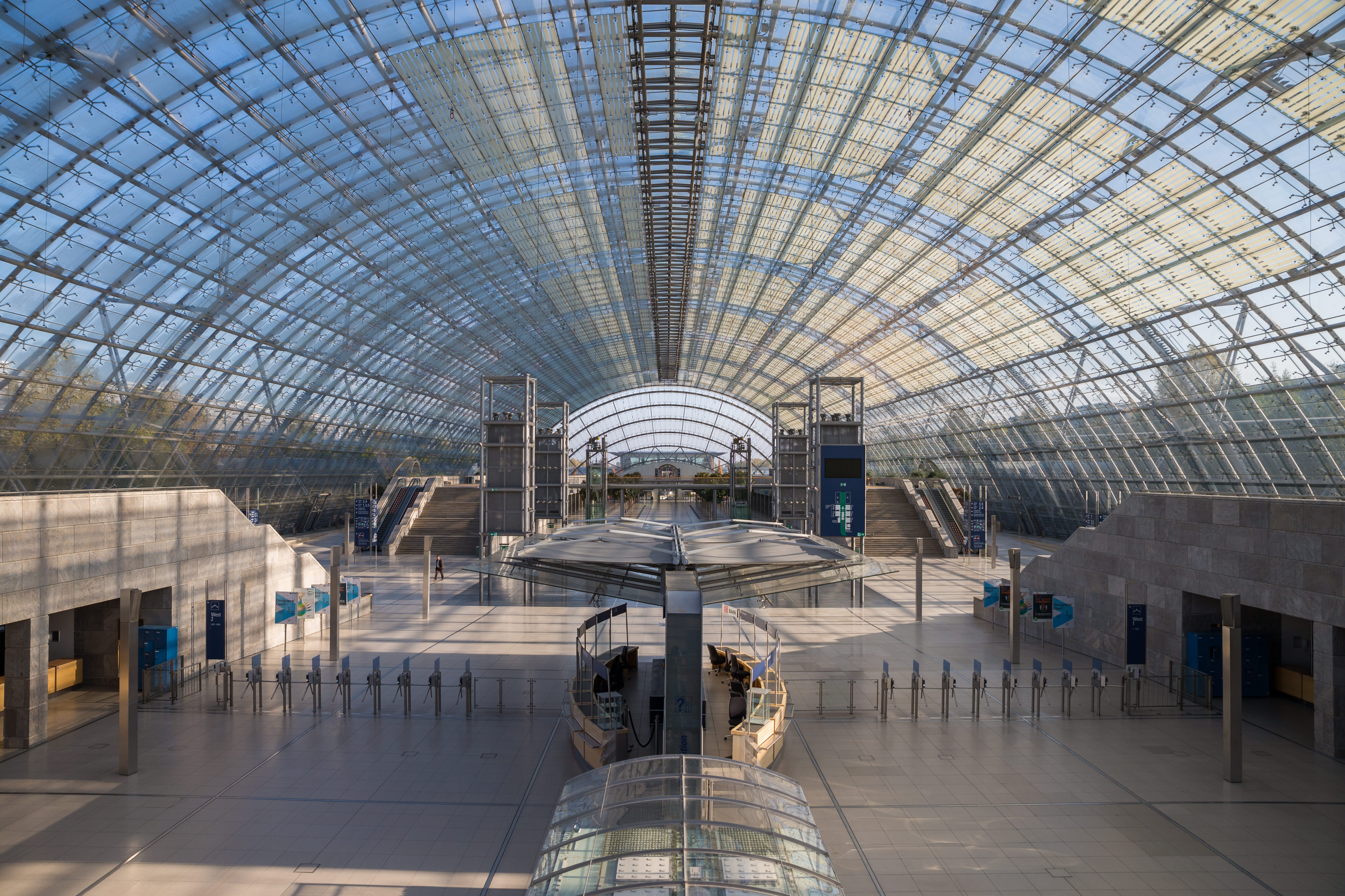 WLM denkmal Leipzig 2014 – Making of